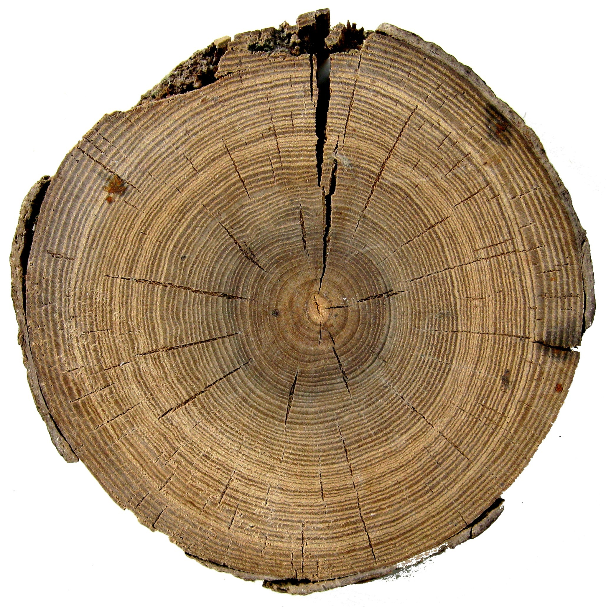 Querschnitt durch Stempelholz aus dem Salzbergwerk Hallstatt, dendrochronologisch datiert auf 680 v.Chr.